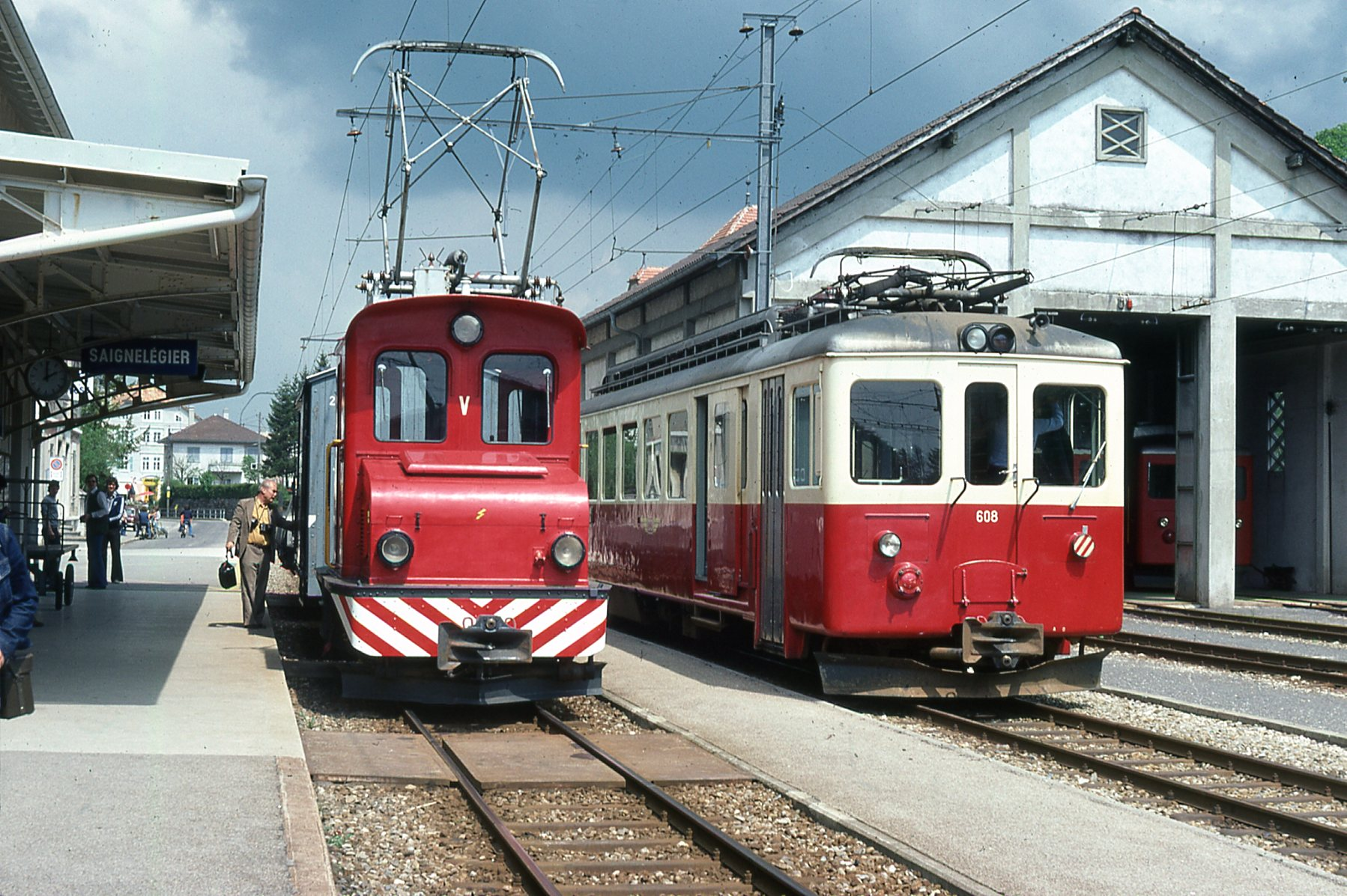 Photo: Trams aux Fils. Prise en juillet 1978 La ligne du C.J. Chemin de Fer du Jura à été construite entre 1884 et 1913 à voie métrique, sa longueur et de 51,1 Kilomètres